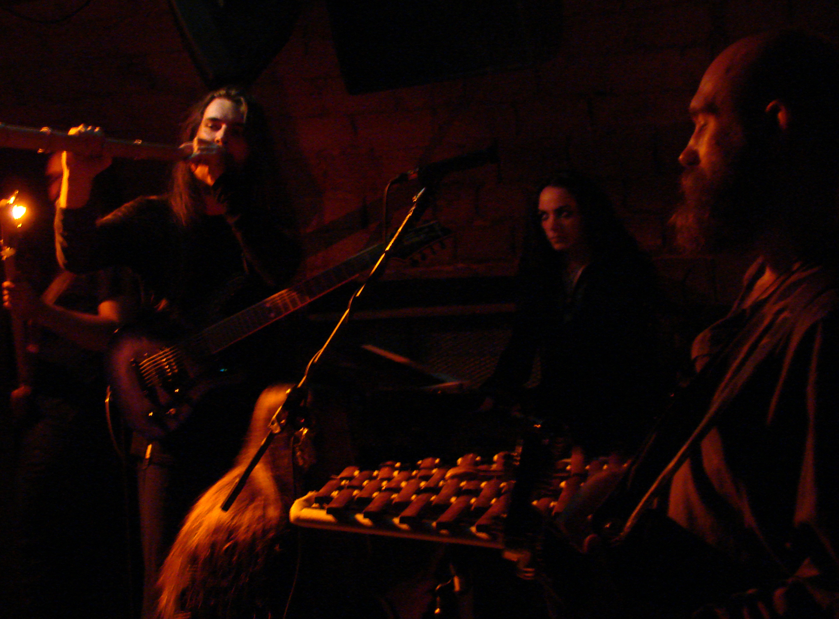 Negura Bunget, groupe roumain de Pagan Black Metal, en concert au Klub, à Paris, le 2/11/08.